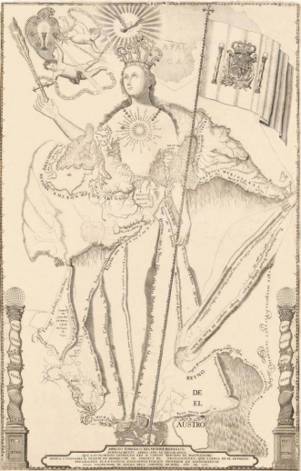 Aspecto Symbólico del Mundo Hispano, Manila, 1761. Ilustración de Theses Matemáticas de Cosmographia, Geographia y Hydrographía de Vicente Memije